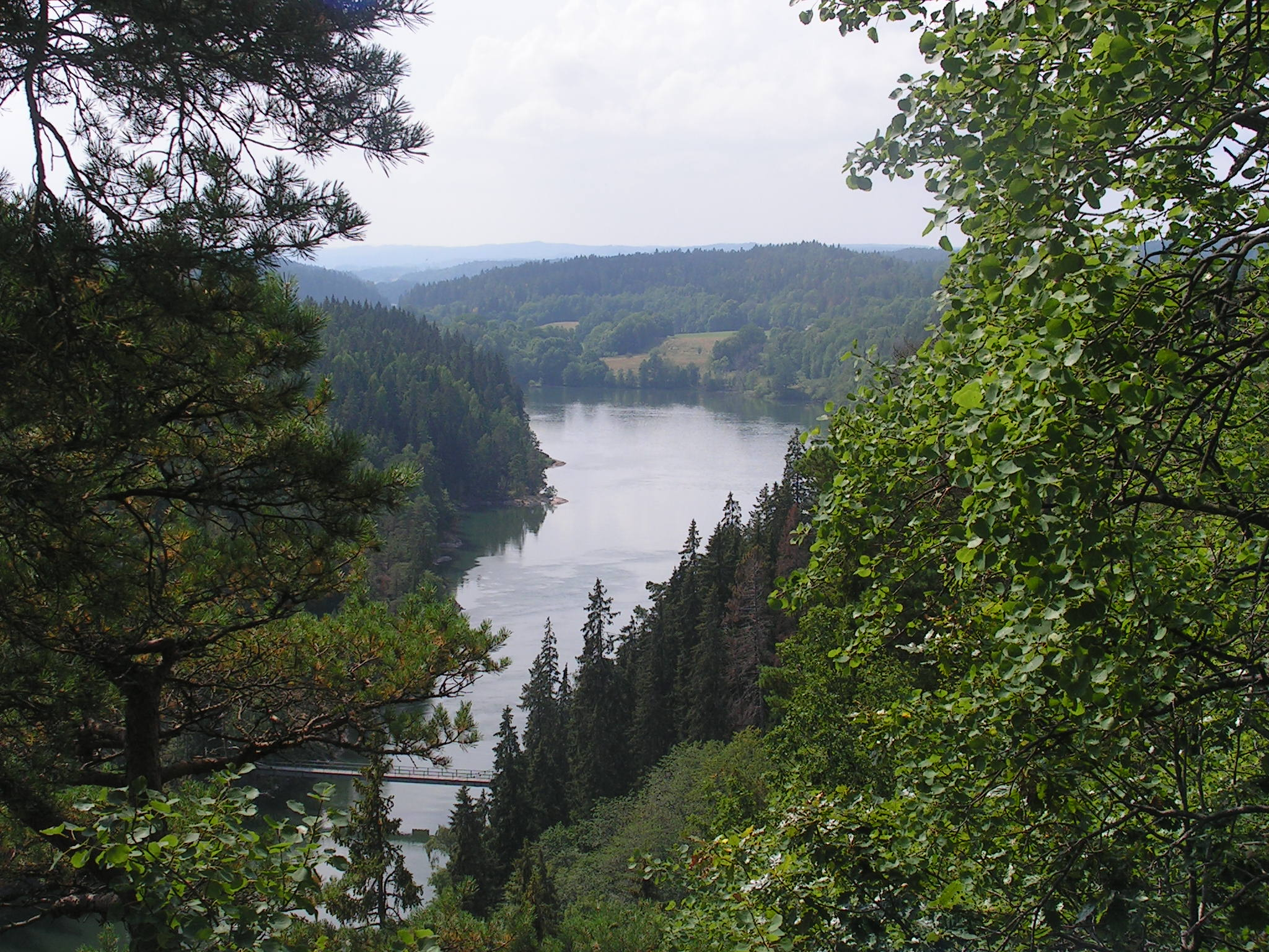 Göta älv, vy från Kopparklinten